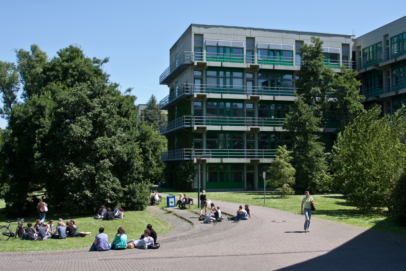 Gebäudeansicht 23.02 Psychologie